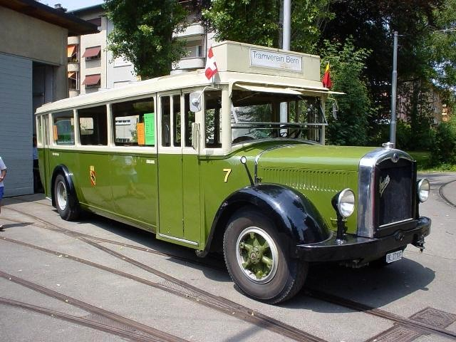 Historischer Stadt Berner Autobus Nr. 7 mit Baujahr 1929 des ehemaligen Unternehmens Stadtomnibus Bern (SOB), vor der heutigen Museumshalle Weissenbühl, dem Stadt Berner Tram Museum, damals Wagenhalle Weissenbühl, im Jahre 2003. Hinweis: Das Bild ist retouchiert. Die Sprayereien auf dem Hallentor wurden elektronisch entfernt.